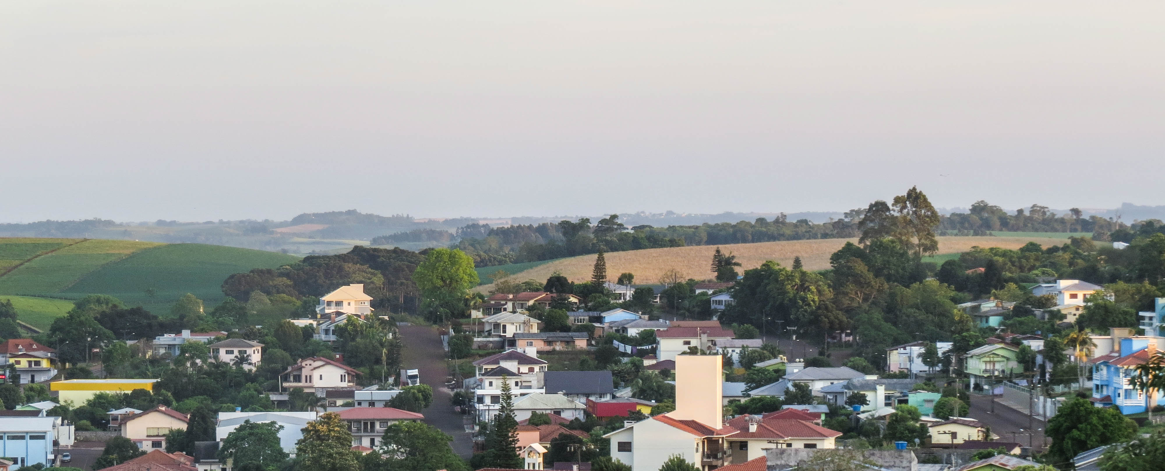 Português do Brasil: Vista parcial da área urbana de Iporã do Oeste